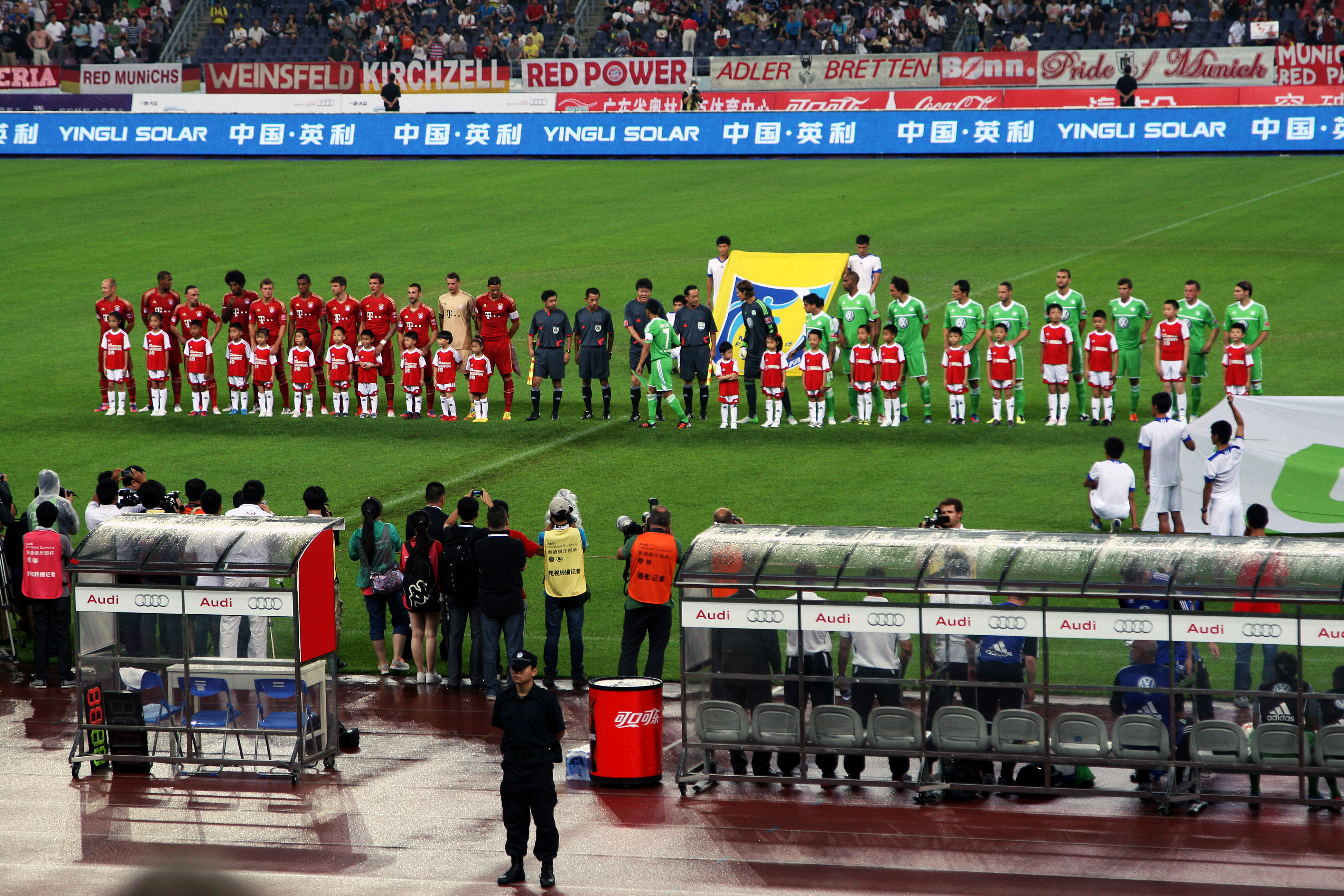 在广东奥林匹克体育中心举行的奥迪俱乐部杯足球赛，由拜仁慕尼黑对阵沃尔夫斯堡